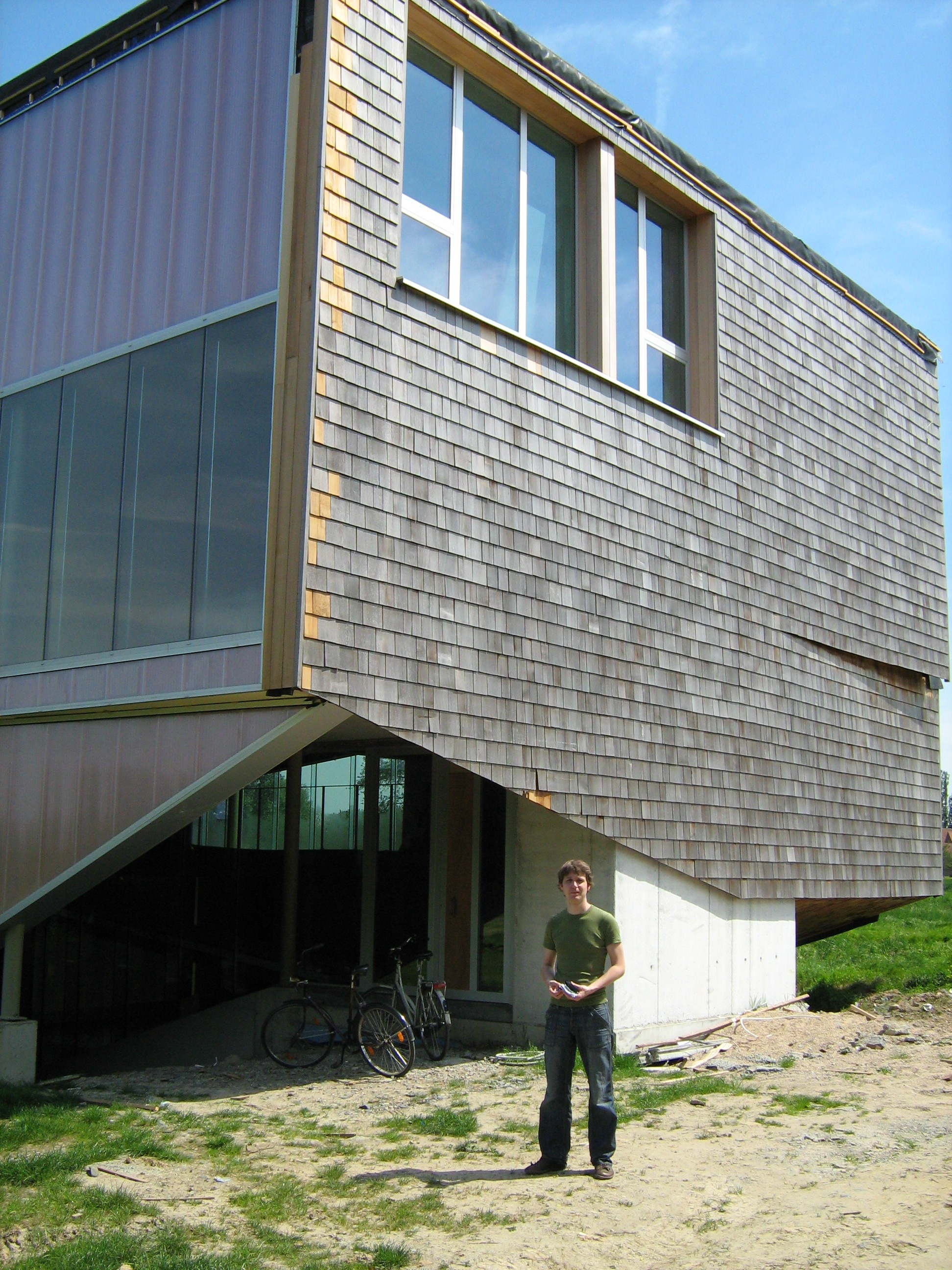 Woning ontworpen door Martine de Maeseneer, Canopé, Elingen, Brussels